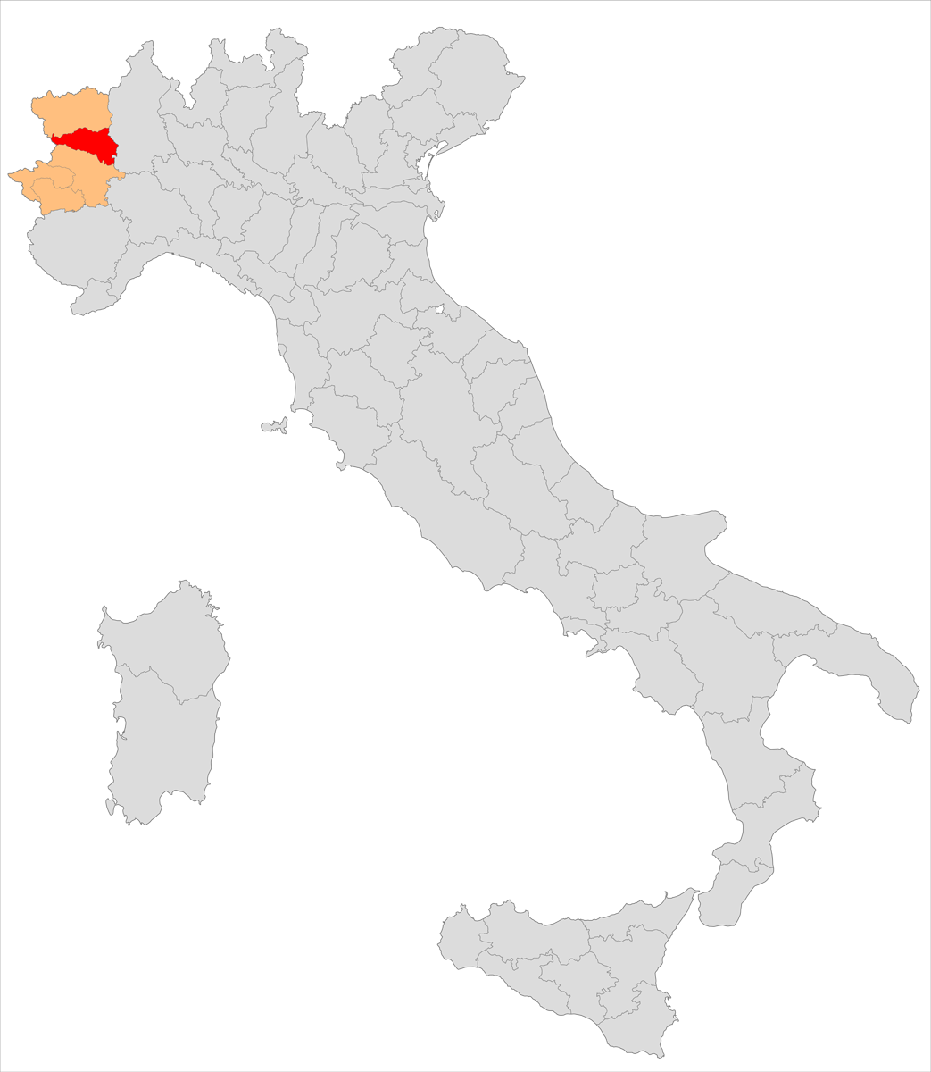 Il circondario di Ivrea nella provincia di Torino (1859-1927)